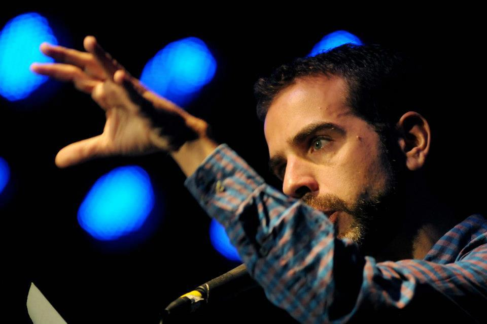 Eduard Escoffet durant una actuació a Eslovènia el 2012